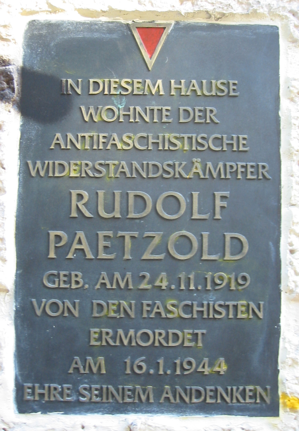 Rudolf Paetzold memorial, Simon-Dach-Straße 33, Berlin